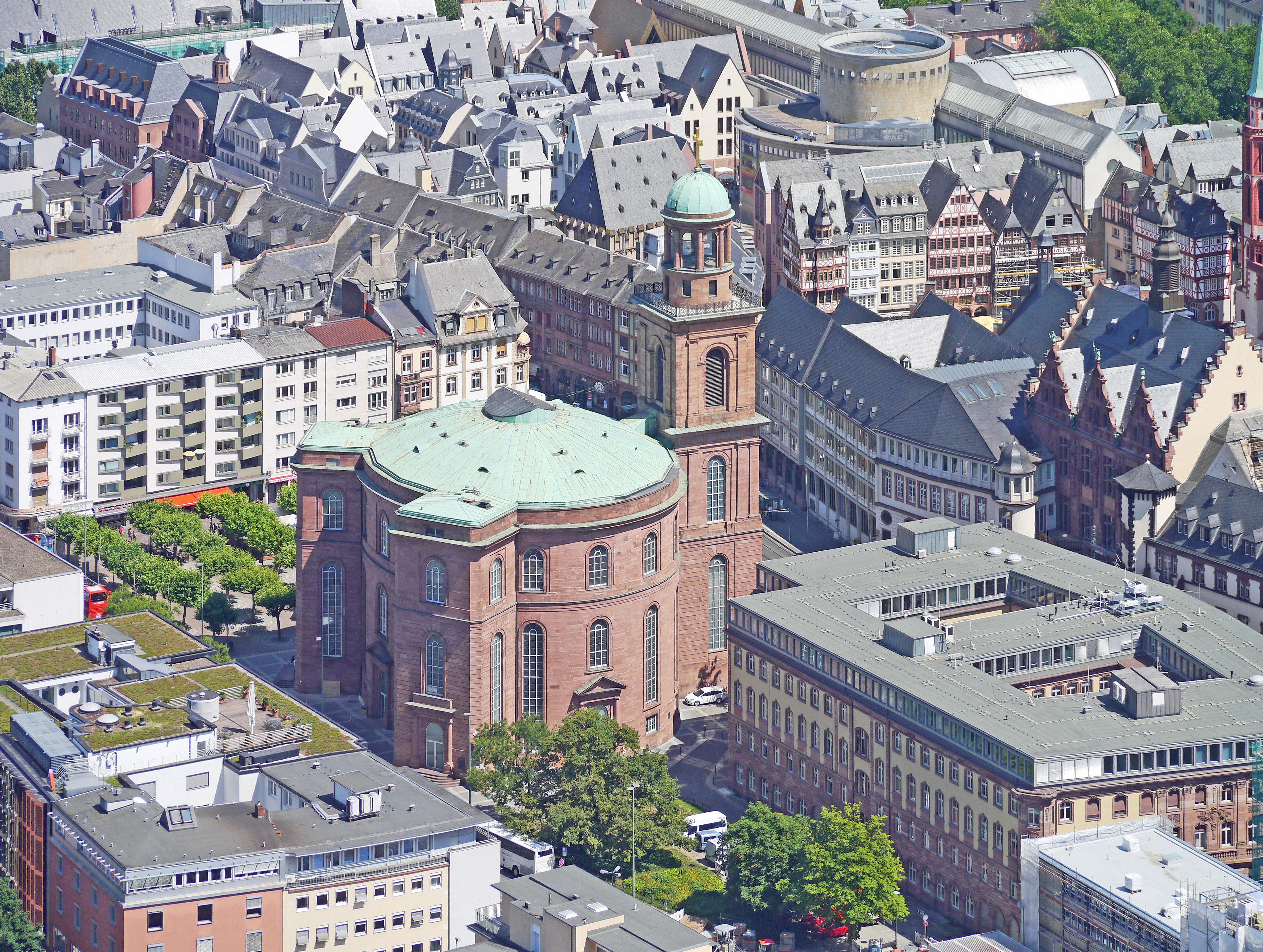 Die Paulskirche, 2018 in Frankfurt am Main vom Maintower aus.